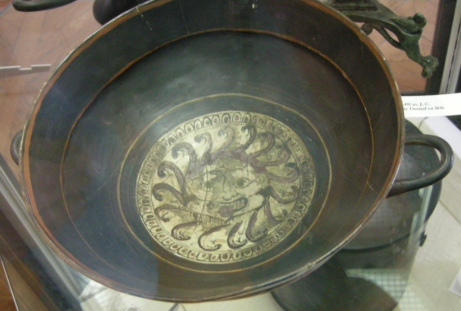 Gorgone. Coupe laconienne à figures noires, v. 565 av. J.-C. Conservée au Cabinet des médailles de la BnF (Paris).